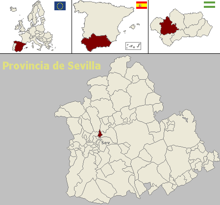 Mapa de localización del municipio sevillano de La Algaba (Andalucía, España)